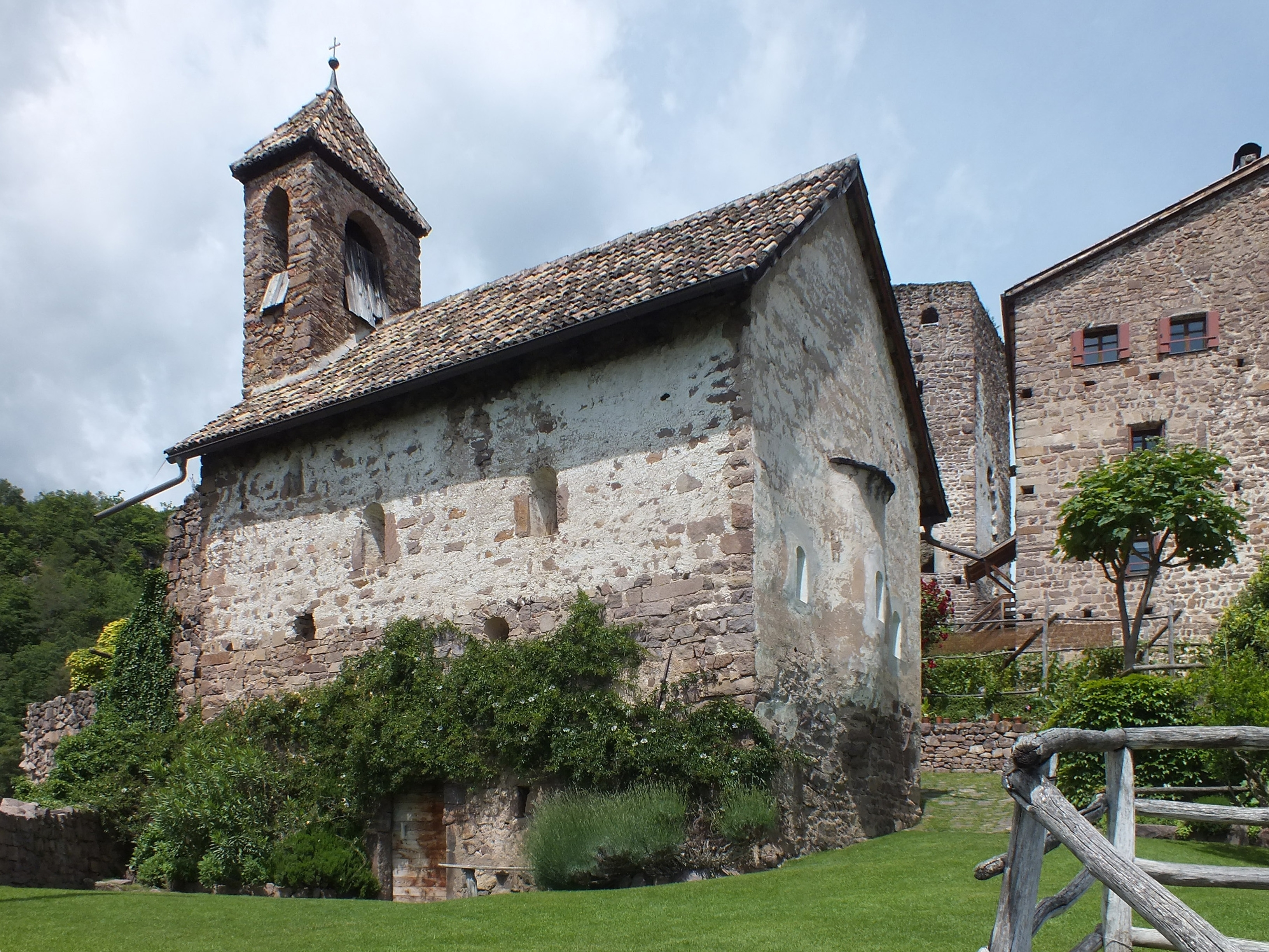 Die Burgkapelle Hocheppan von Süden gesehen